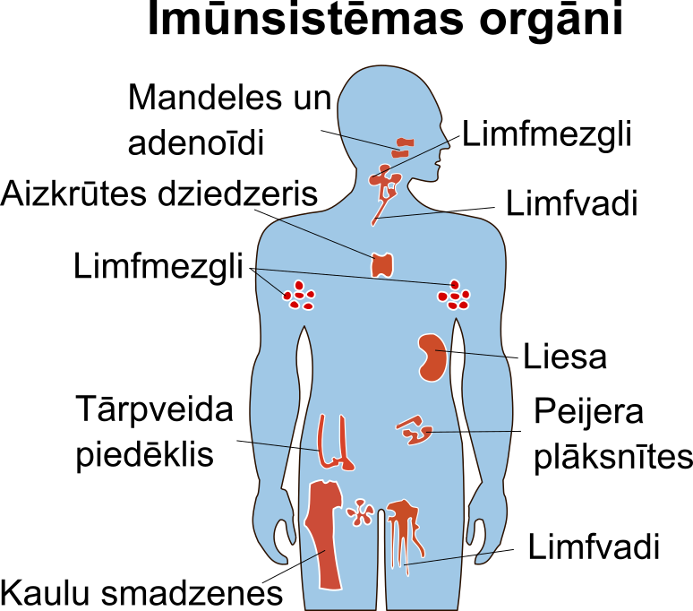 Imūnsistēmas orgāni un audi